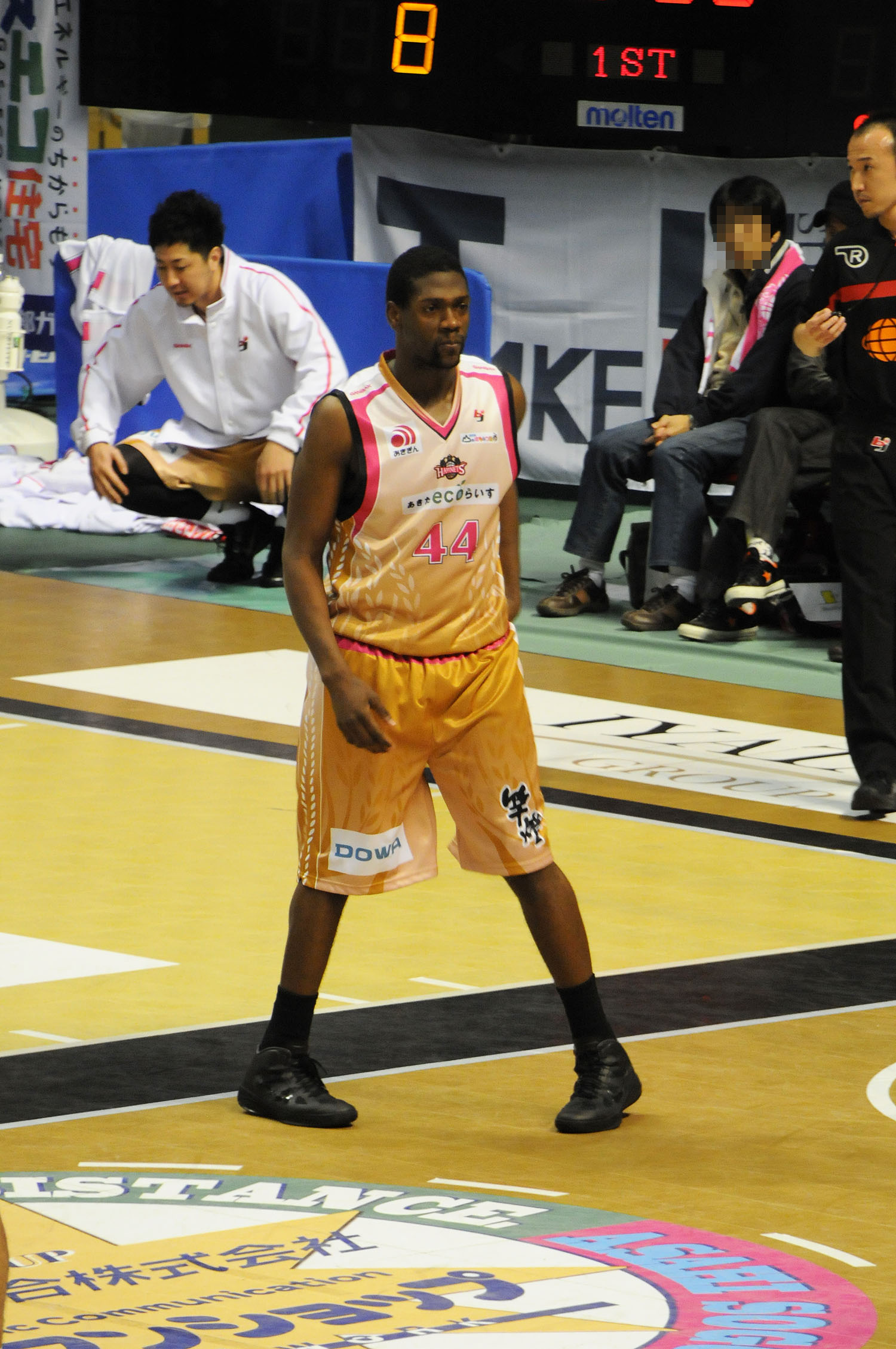 秋田ノーザンハピネッツ、アントニオ・バークス選手。秋田市立体育館で。